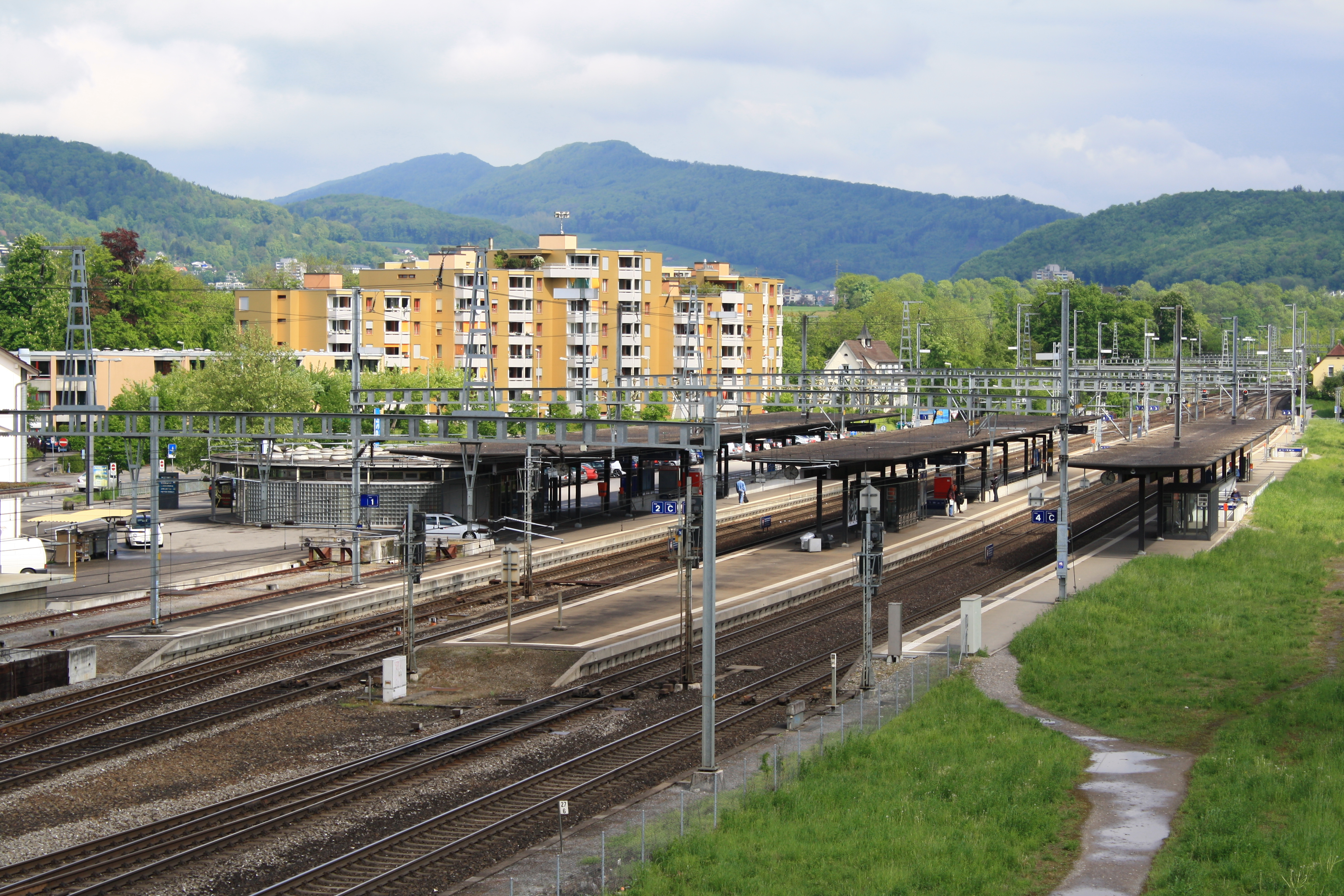 Bahnhof Turgi (Switzerland)